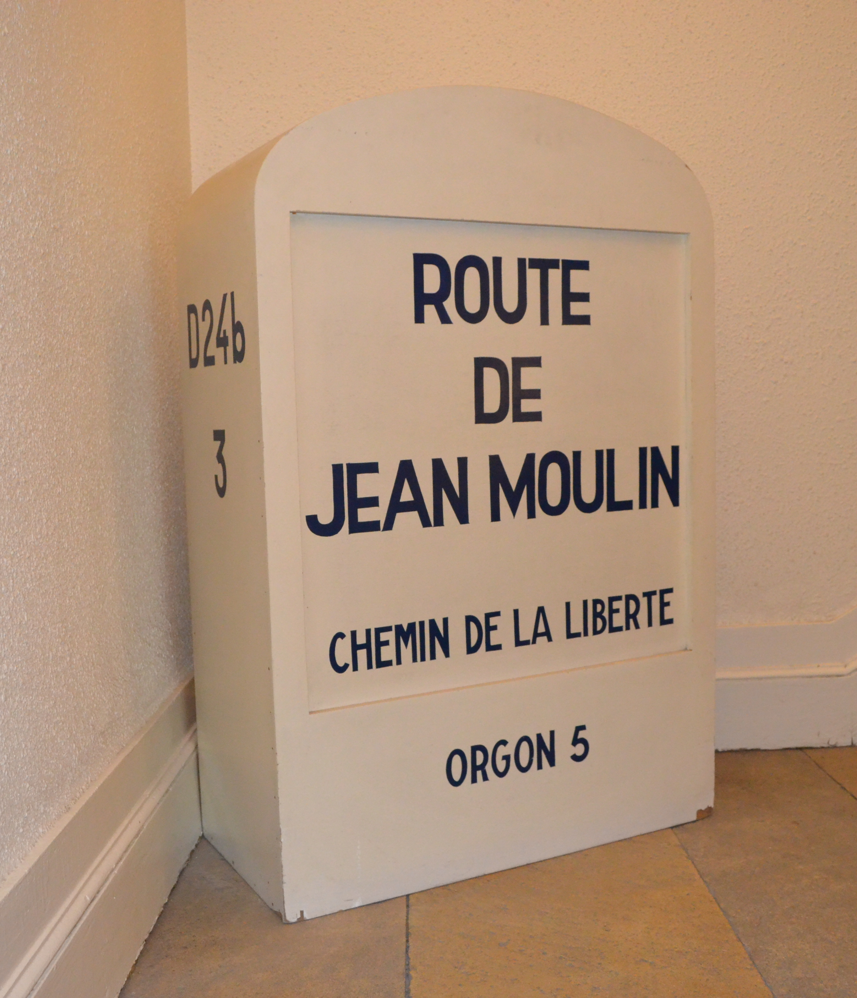 Photographies prises au cours de Wiki-Day 2014 à Bordeaux.